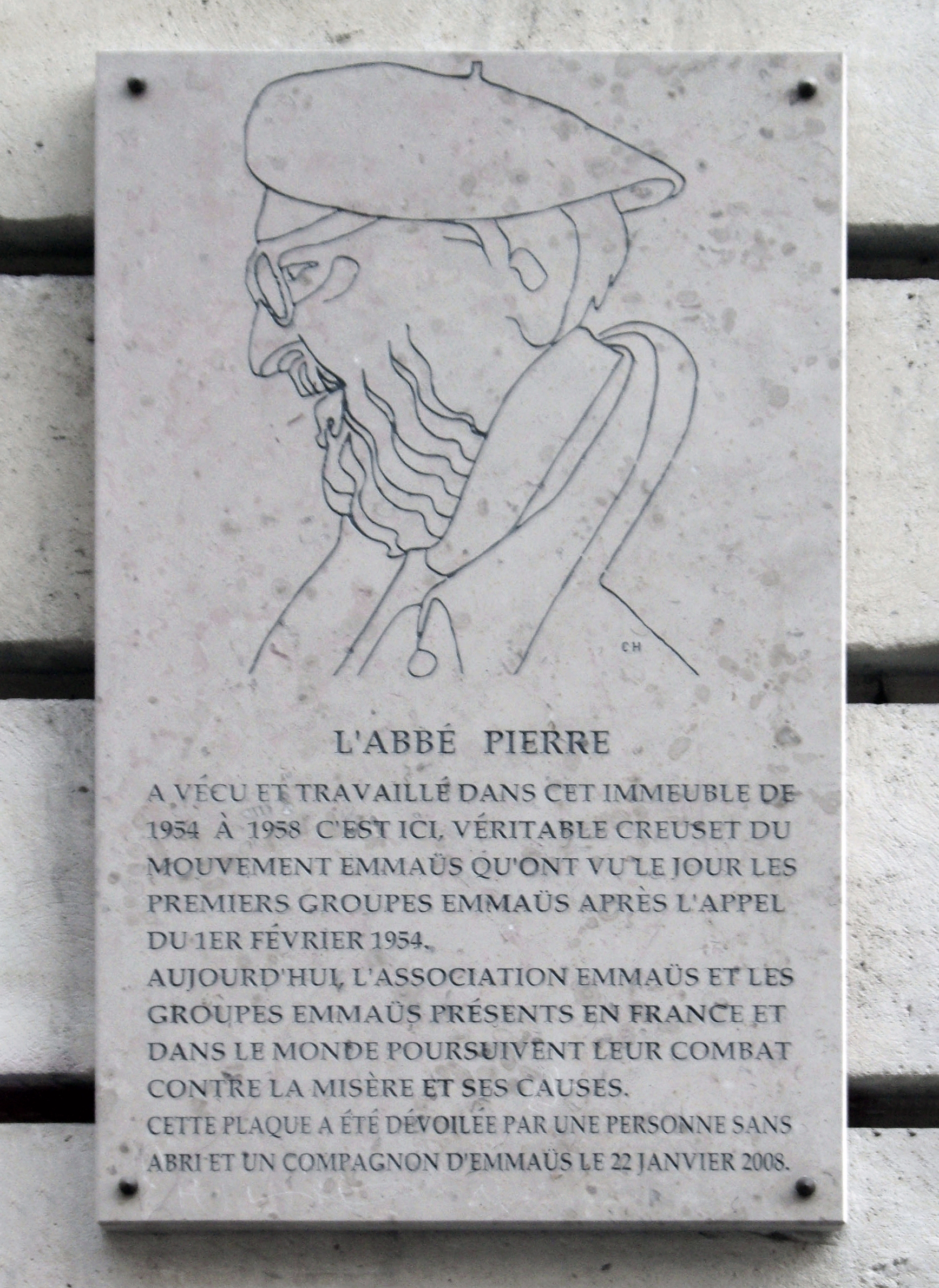 Plaque commémorative, 32 rue des Bourdonnais, Paris 1er.« L'abbé Pierre a vécu et travaillé dans cet immeuble de 1954 à 1958. C'est ici, véritable creuset du mouvement Emmaüs, qu'ont vu le jour les premiers groupes Emmaüs après l'appel du 1er février 1954.Aujourd'hui, l'association Emmaüs et les groupes Emmaüs présents en France et dans le monde poursuivent leur combat contre la misère et ses causes.Cette plaque a été dévoilée par une personne sans abri et un compagnon d'Emmaüs le 22 janvier 2008. »